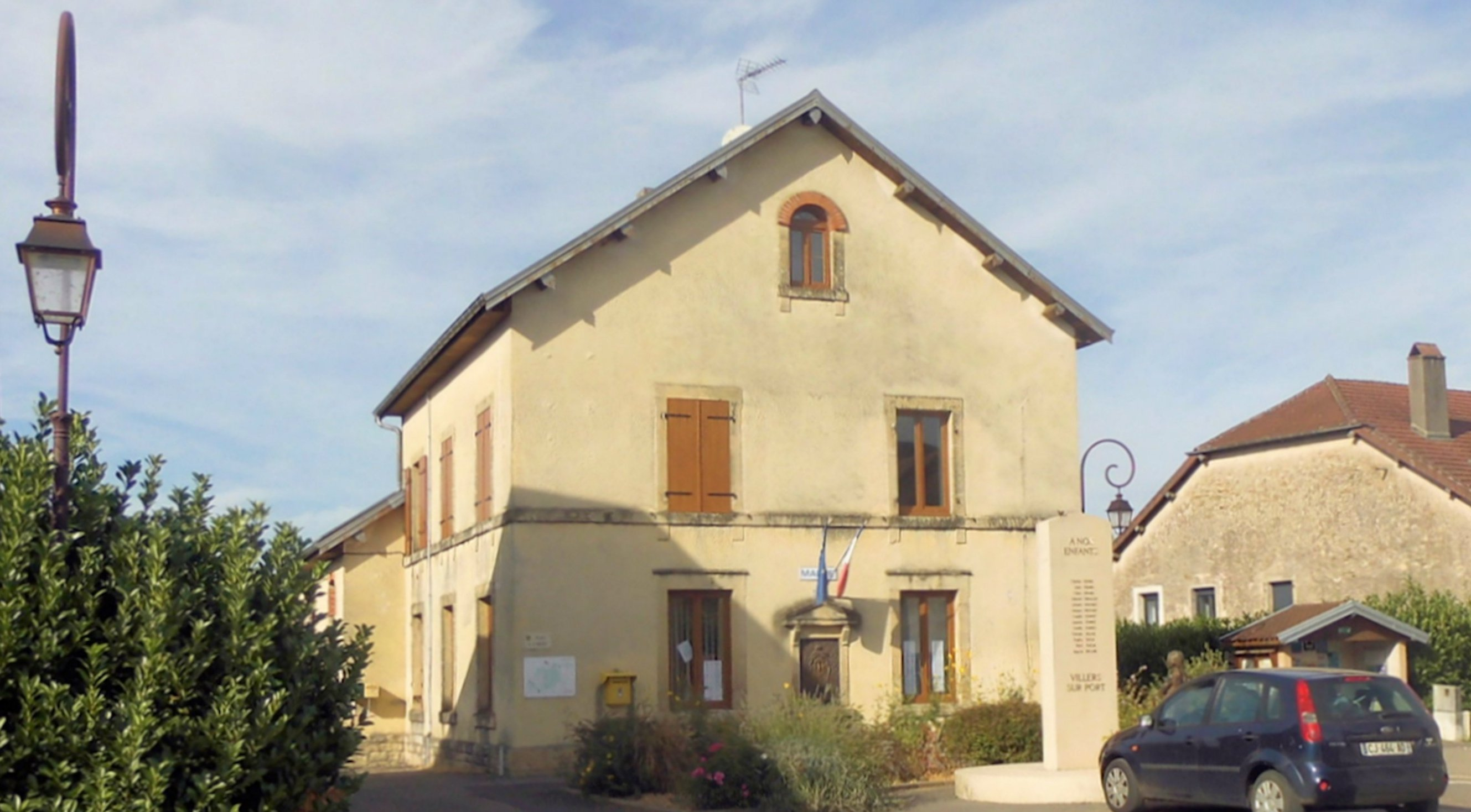 La mairie de Villers-sur-Port